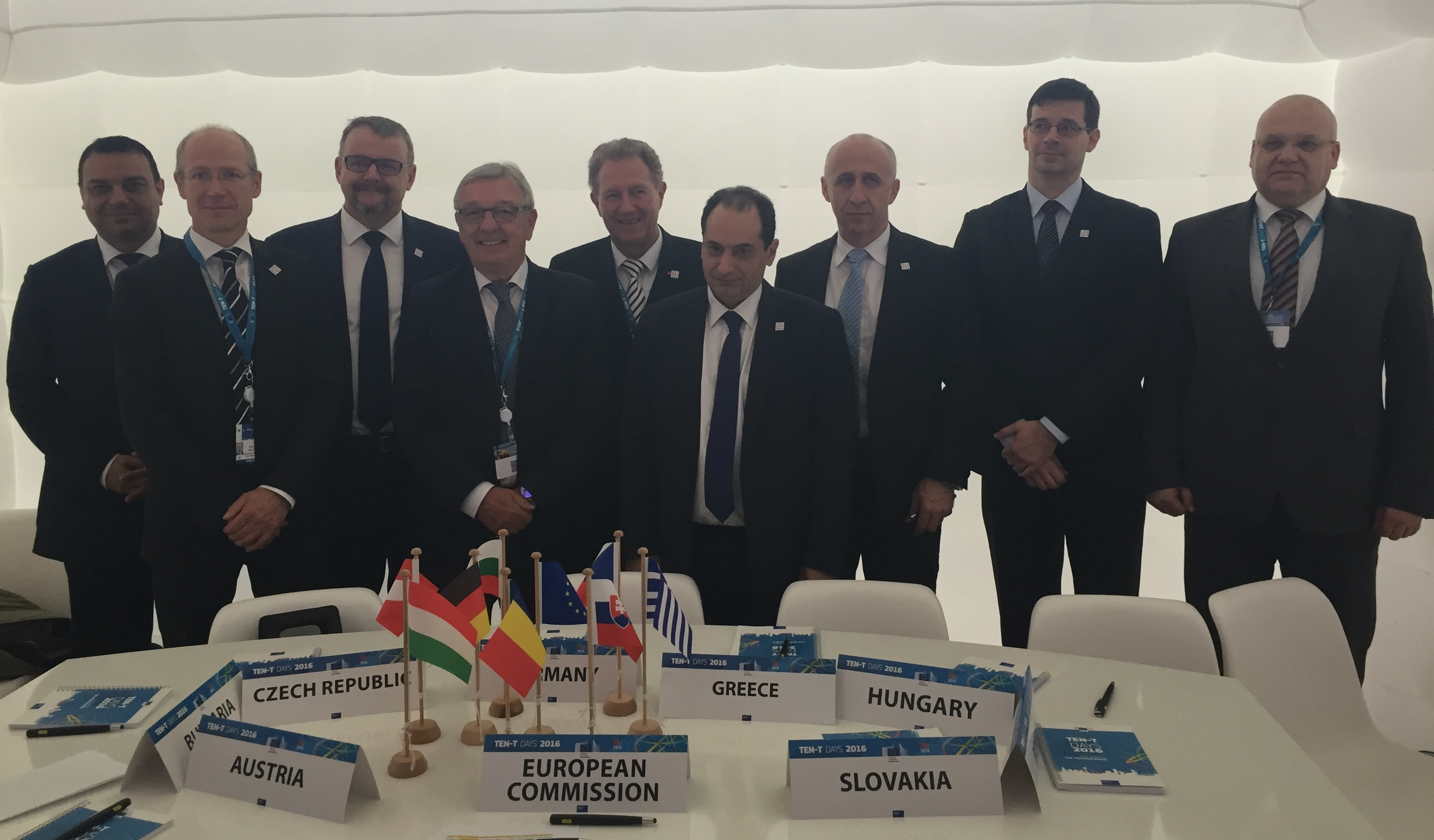 Miniștrii țărilor riverane Dunării, după semnarea acordului pentru coridoarele de marfă